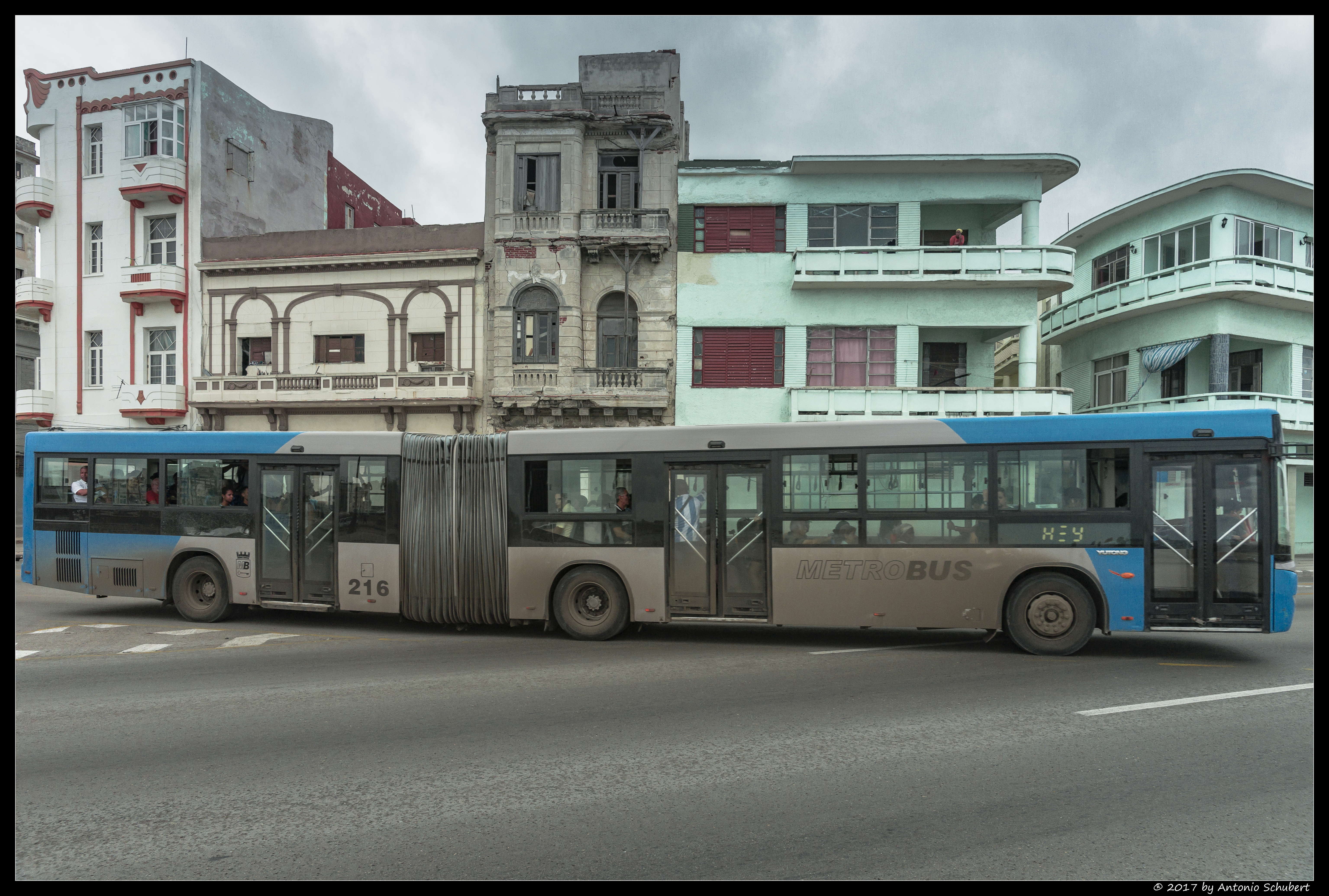 La Habana